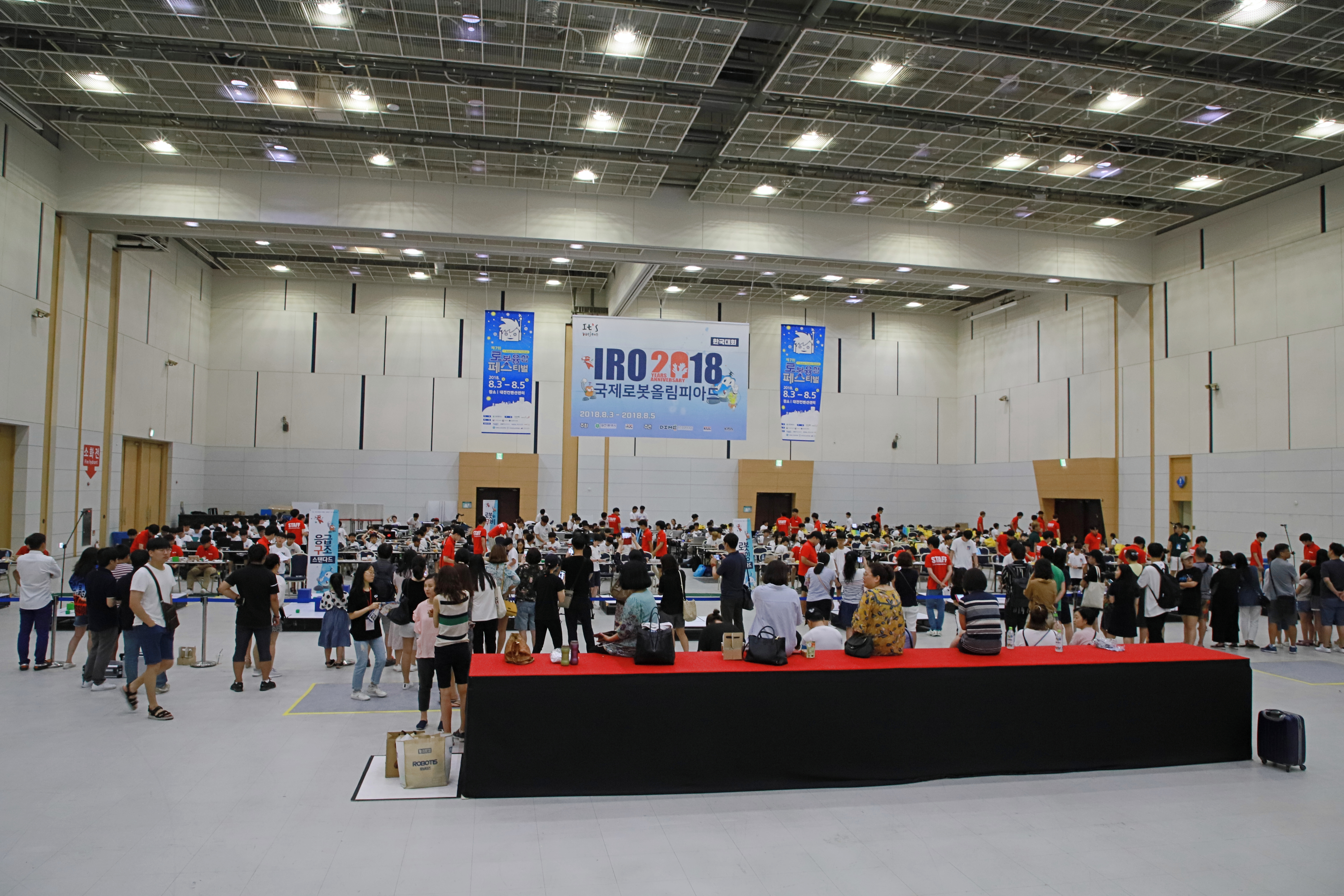 2018 대전로봇융합페스티벌